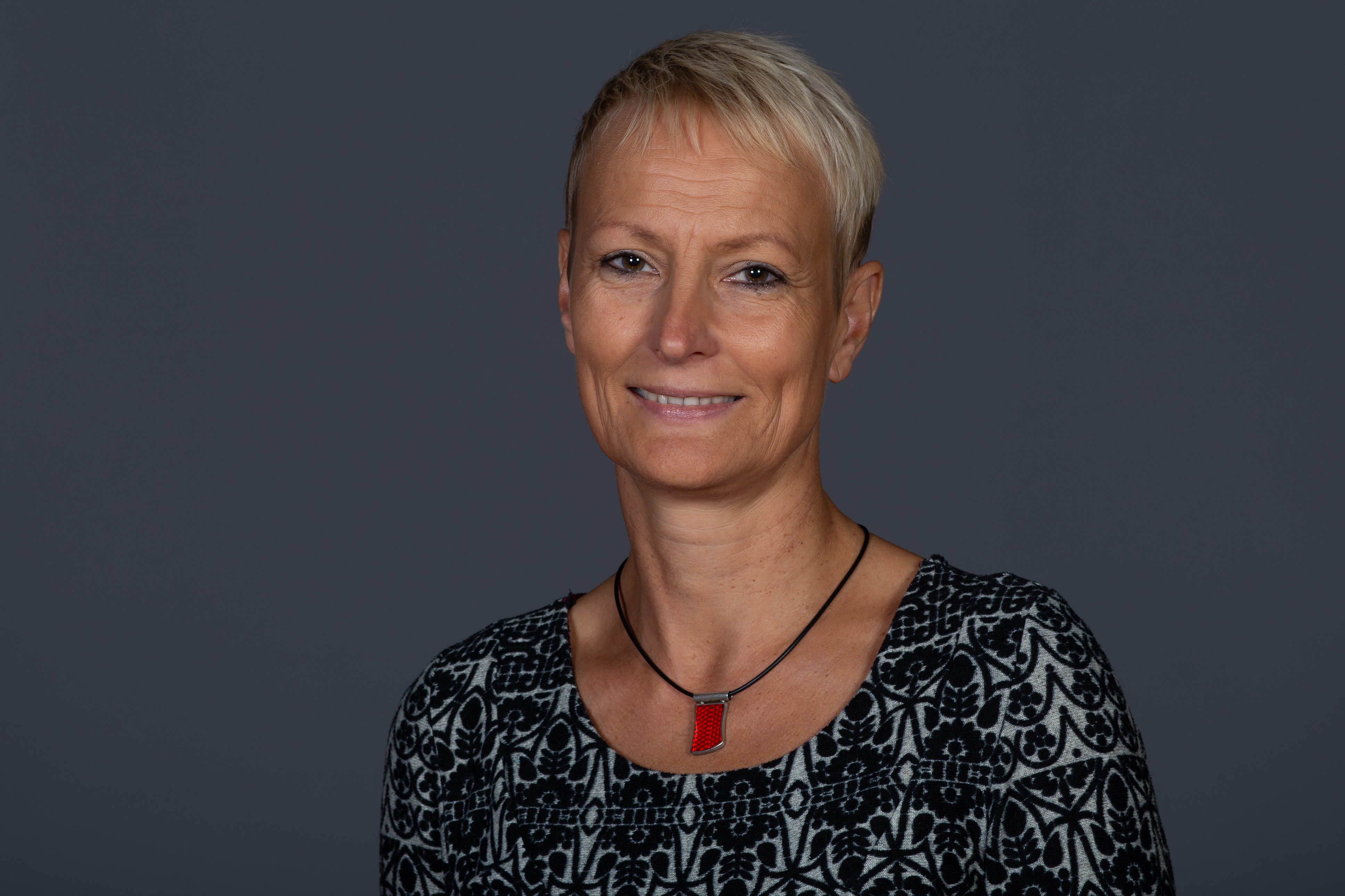 Abgeordnete(r) der Bürgerschaft der Freien und Hansestadt Hamburg Stefanie von Berg